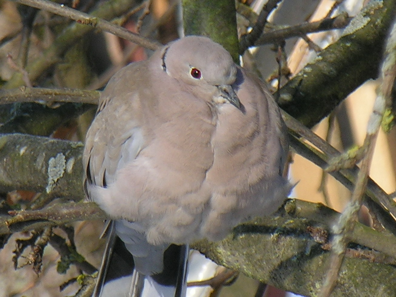 Streptopelia decaocto